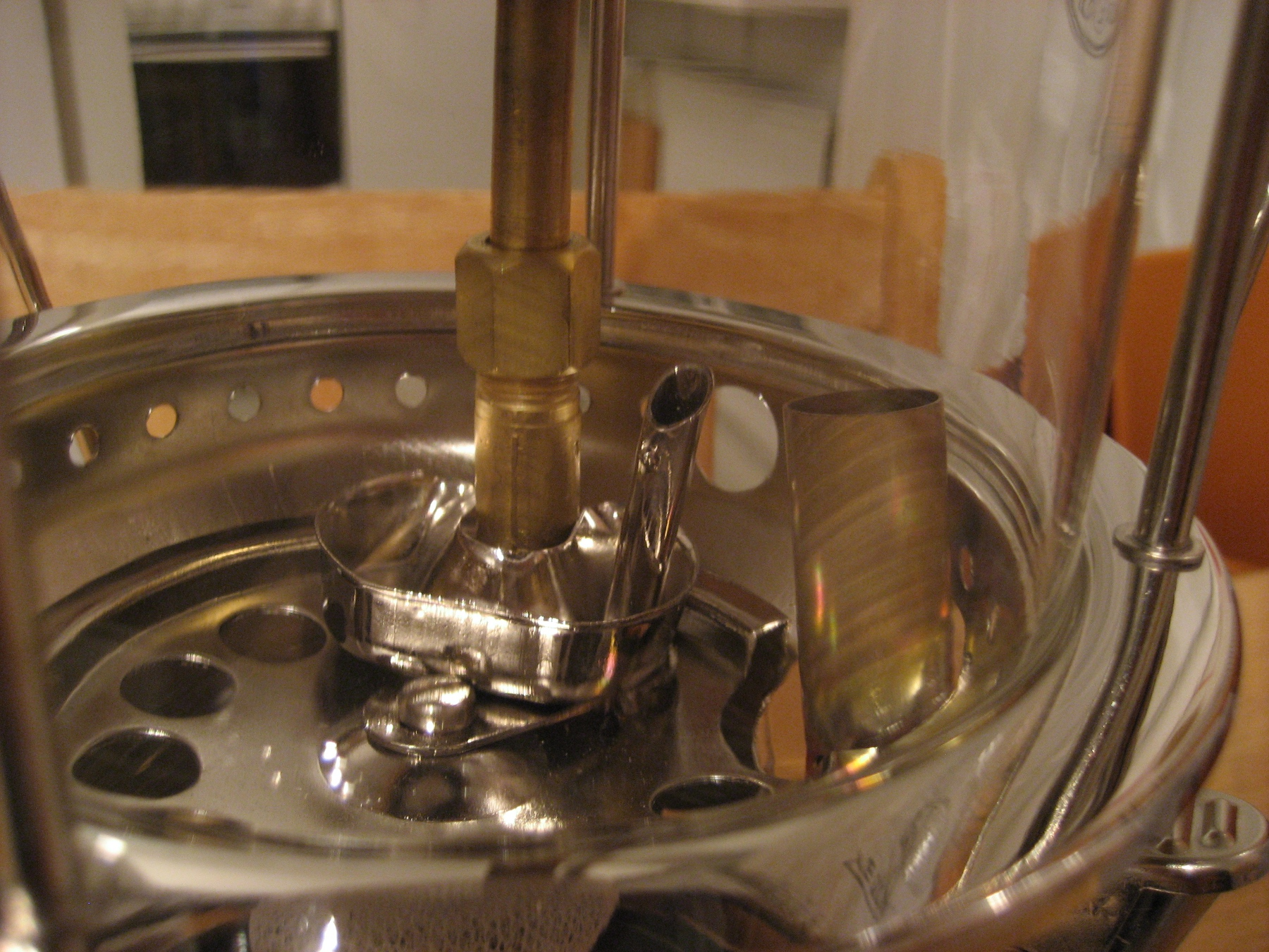 Petromax HK500 voimavalolyhdyn esilämmitykseen käytettävä spriikuppi ja puhalluslamppu.